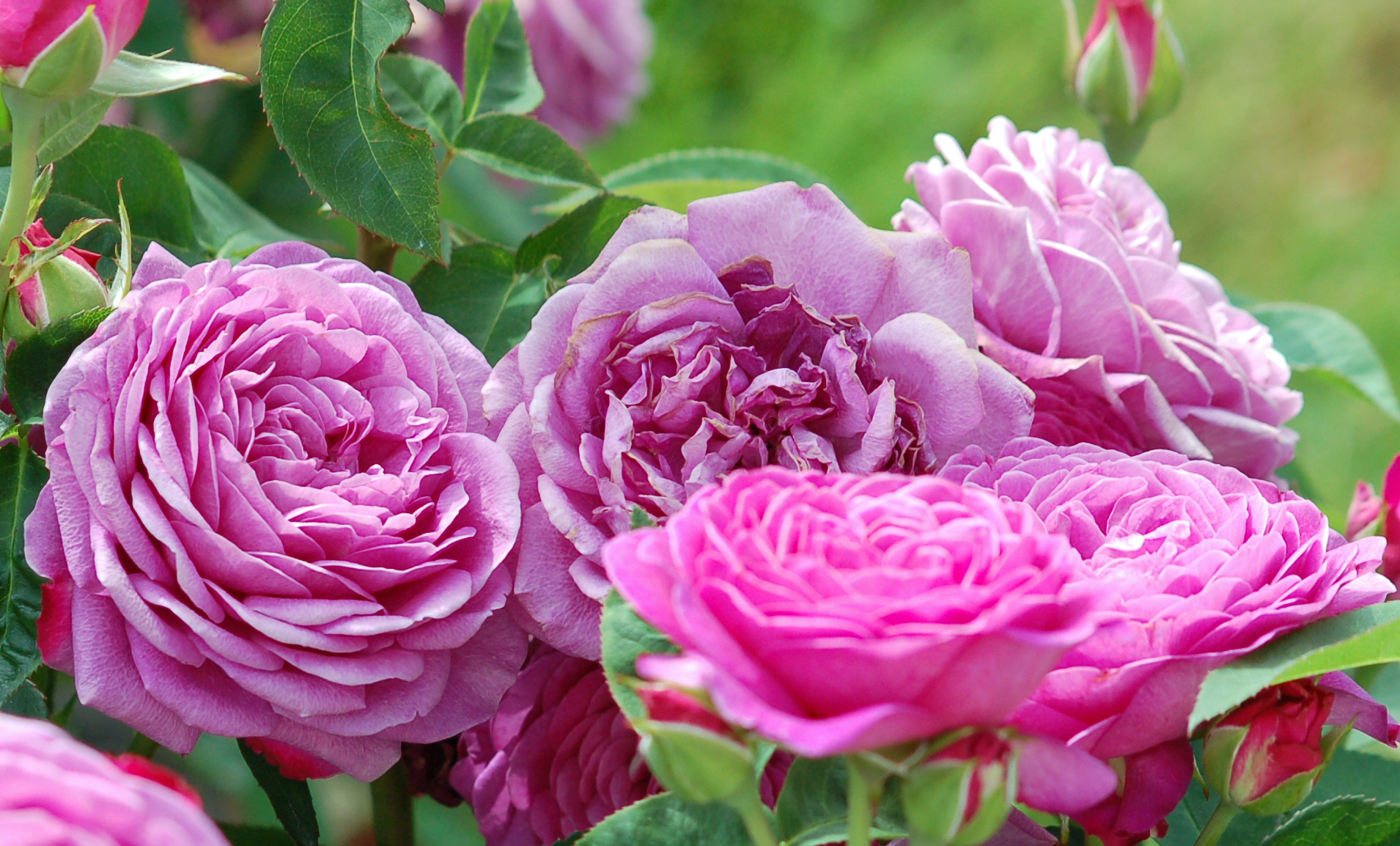 Nostalgische Beetrose Heidi-Klum-Rose (Tantau 2006)